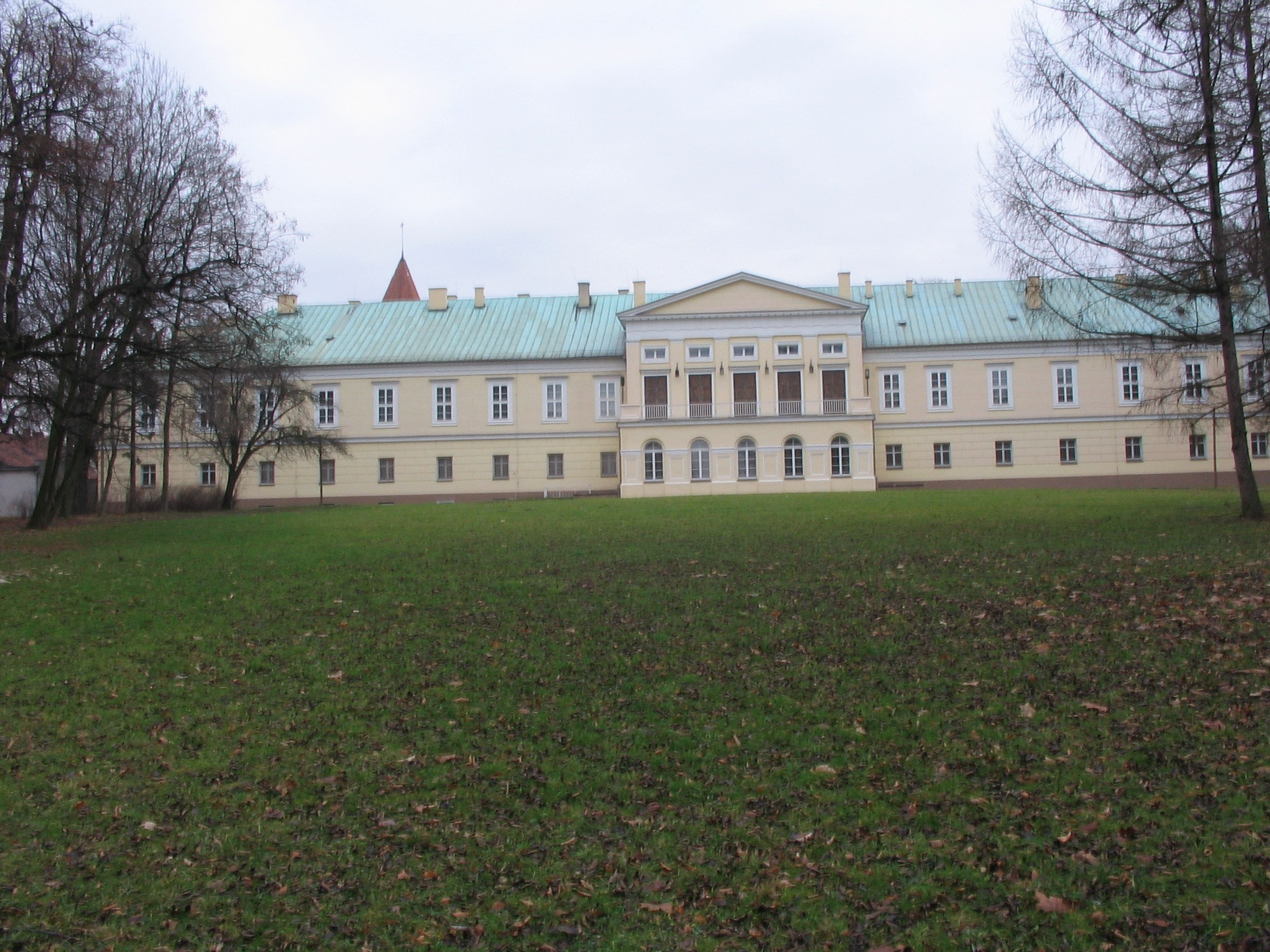 Zamek w Koszęcinie